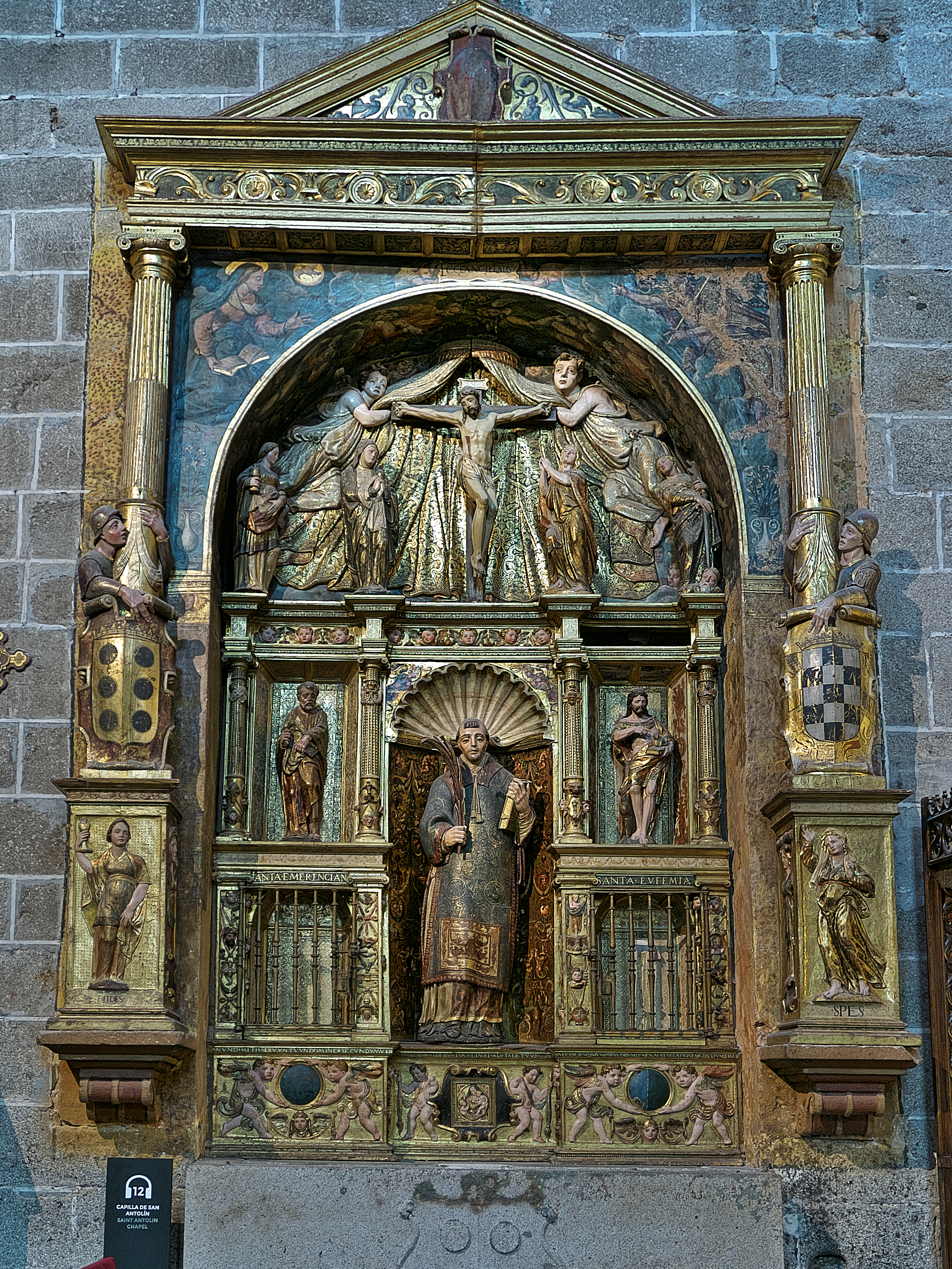 Capilla de San Antolín. Situada en el testero norte del crucero, fundada por el deán Blasco Velázquez. Interesante retablo de Isidro de Villoldo (1551) dedicado a San Antolín.